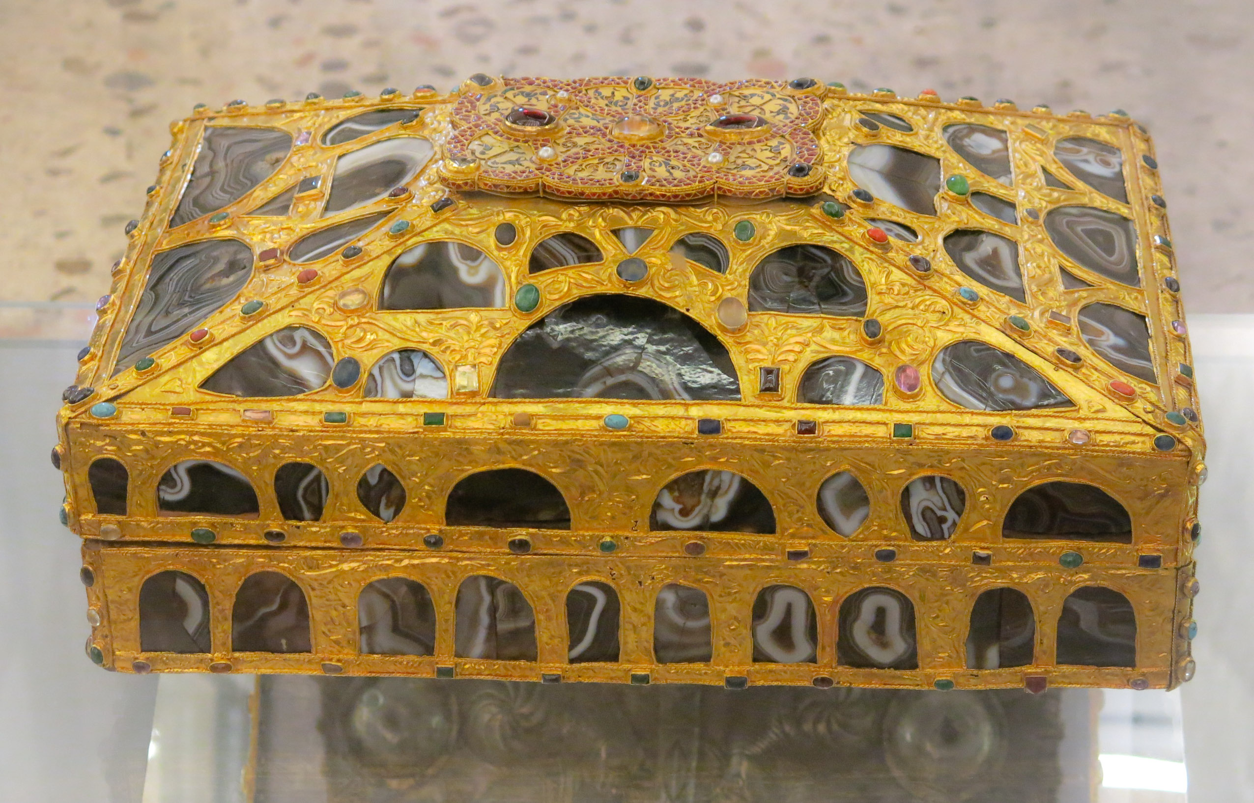 Catedral de San Salvador